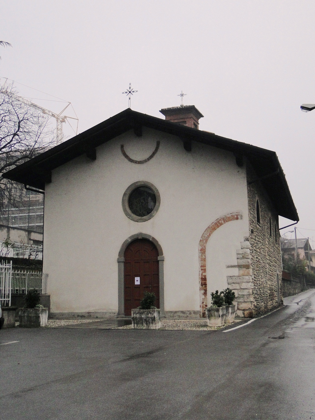 Alzano Sopra, fraz. di Alzano Lombardo (BG). Chiesa di San Giuliano